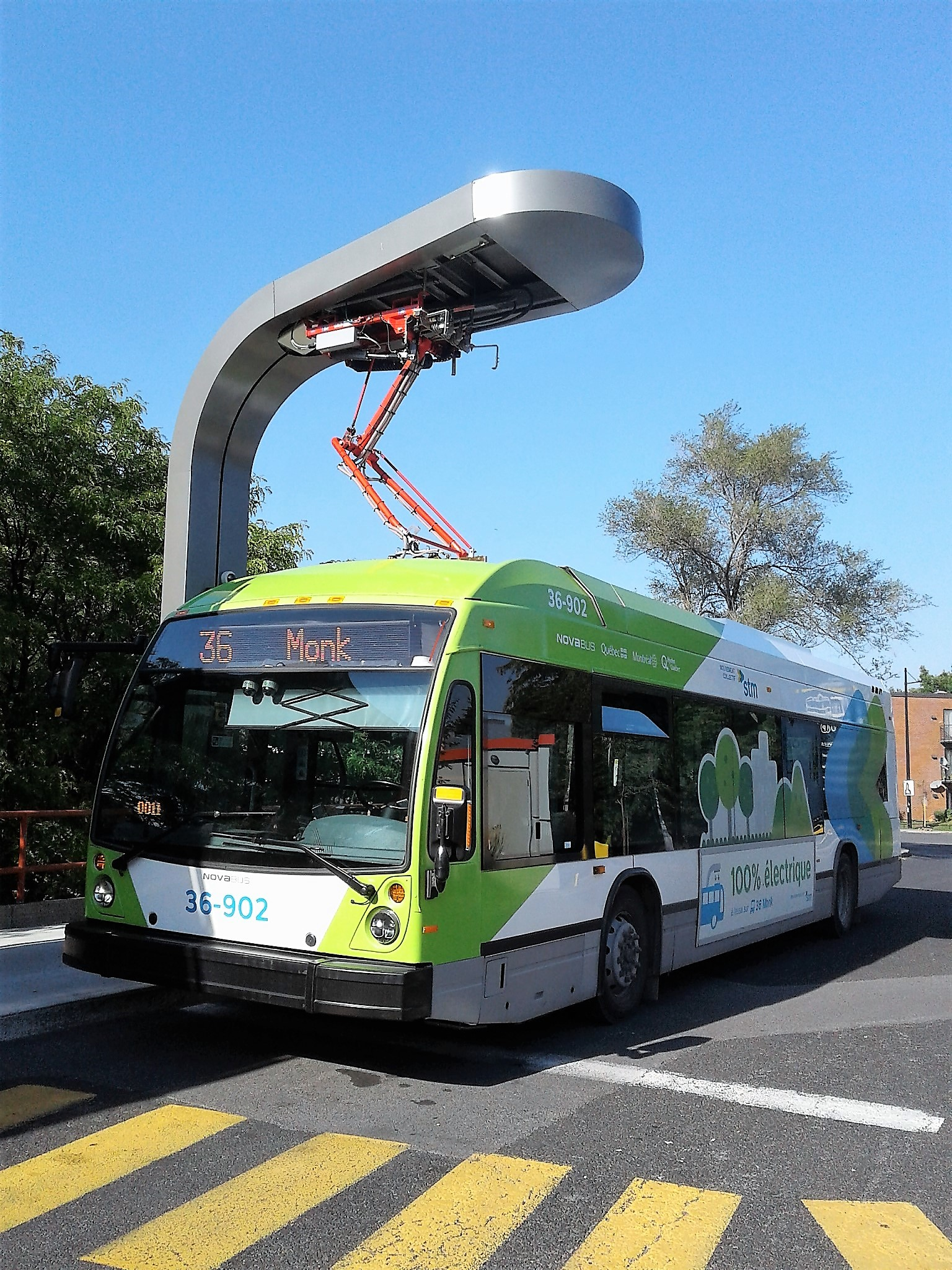 Autobus 36-902 de la Société de transport de Montréal, à la station Angrignon cptdb.ca